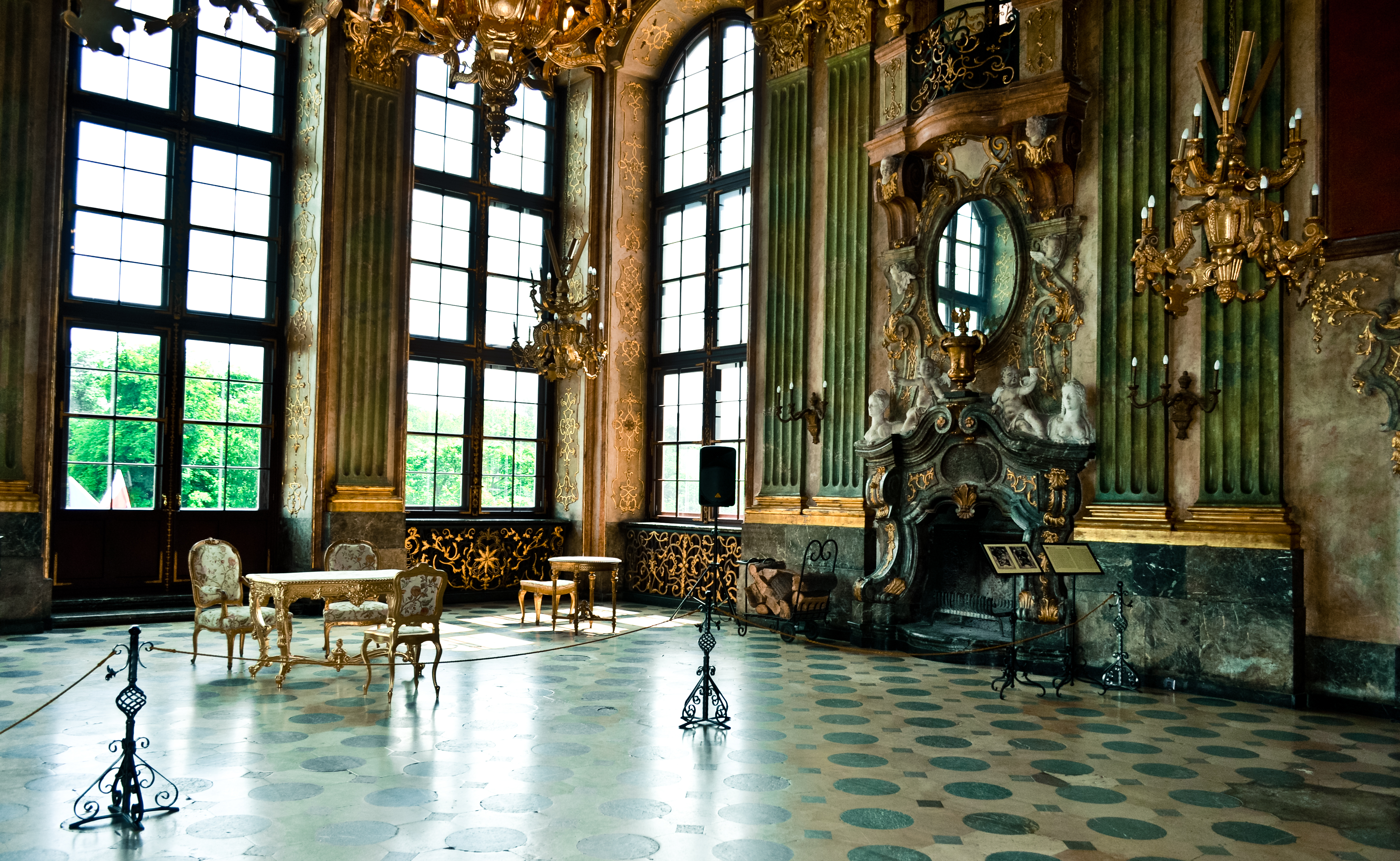 Wałbrzych, zamek